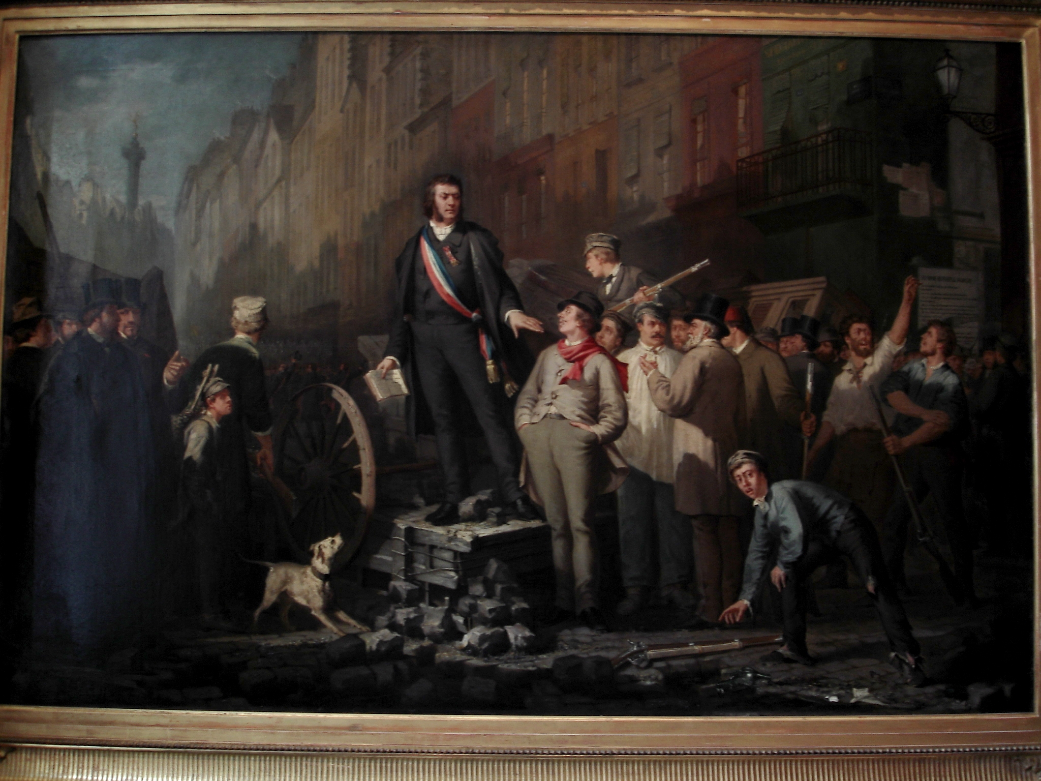 Jean-Baptiste Baudin sur les barricades à Paris en 1851, juste avant sa mort